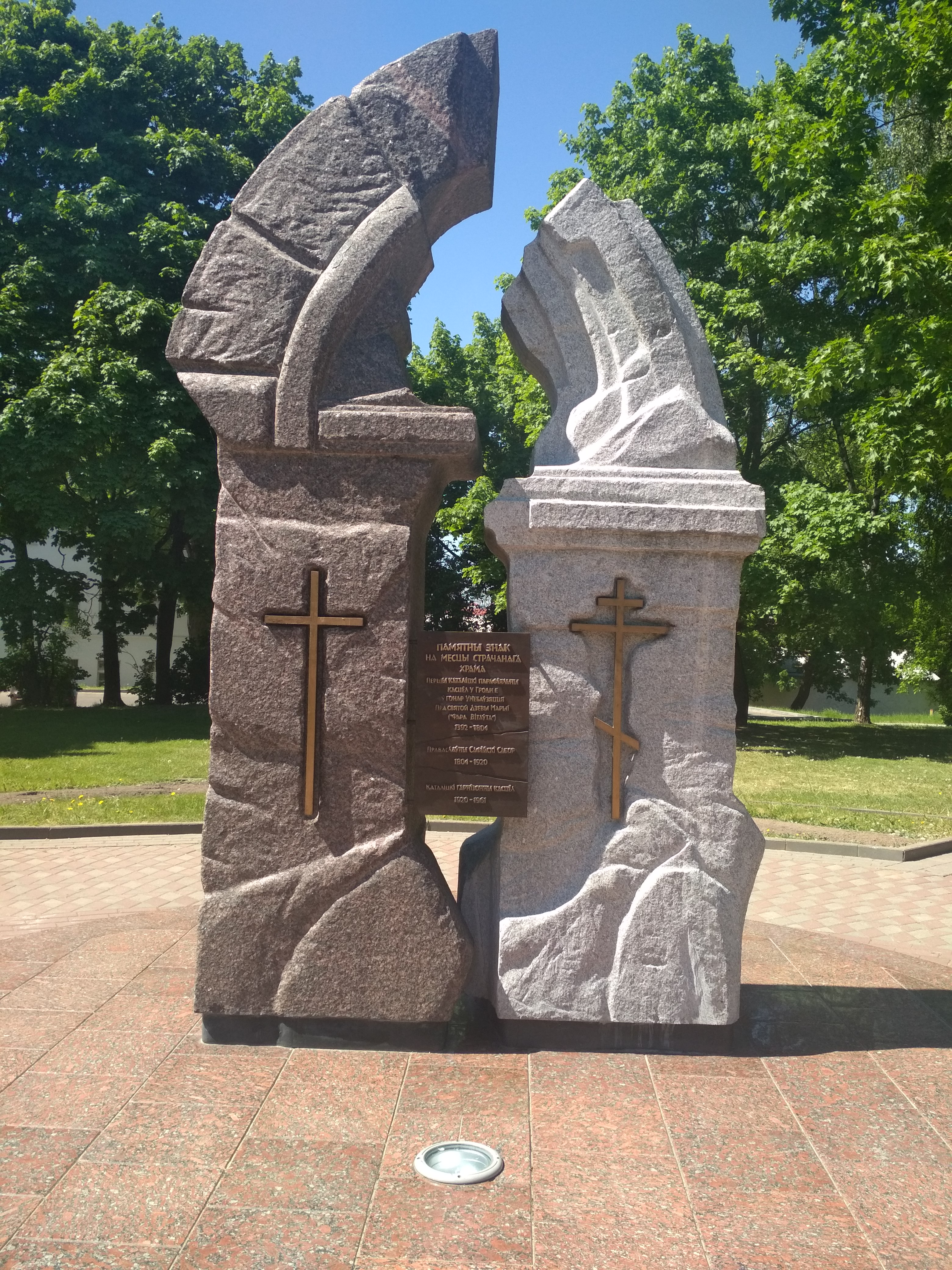 Гродна (2018). Помнік на месцы Фары Вітаўта